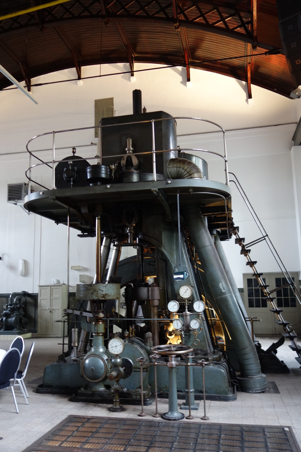 Wasserwerk Bockum - Maschine 3